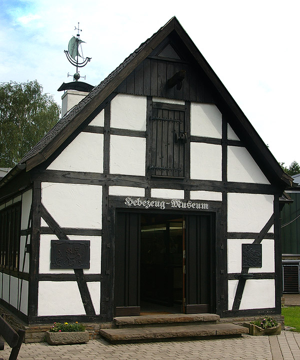 Witten-Heven, Hebezeugmuseum. Fachwerkhaus, Ausstellungsgebäude des Hebezeug-Museums in Witten-Heven; das Museum gehört dem Unternehmen J.D. Neuhaus, das 1746 in Witten (Heven) gegründet wurde und somit zu den ältesten Unternehmen in Deutschland gehört.